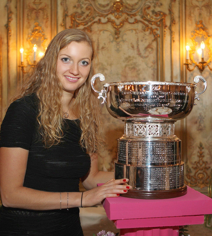 Česká tenistka Petra Kvitová s pohárem pro vítězky Fed Cupu 2011